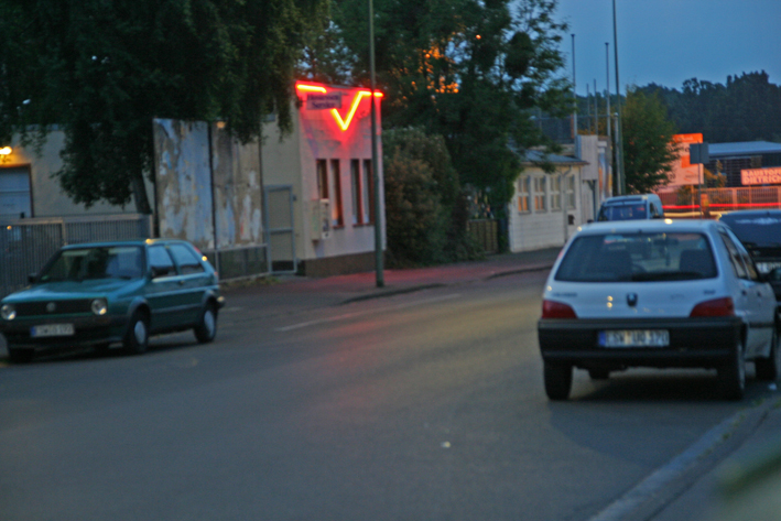 Erzbergerstraße mit Blick auf das Fenster zum Hof und die Wolfhager Straße